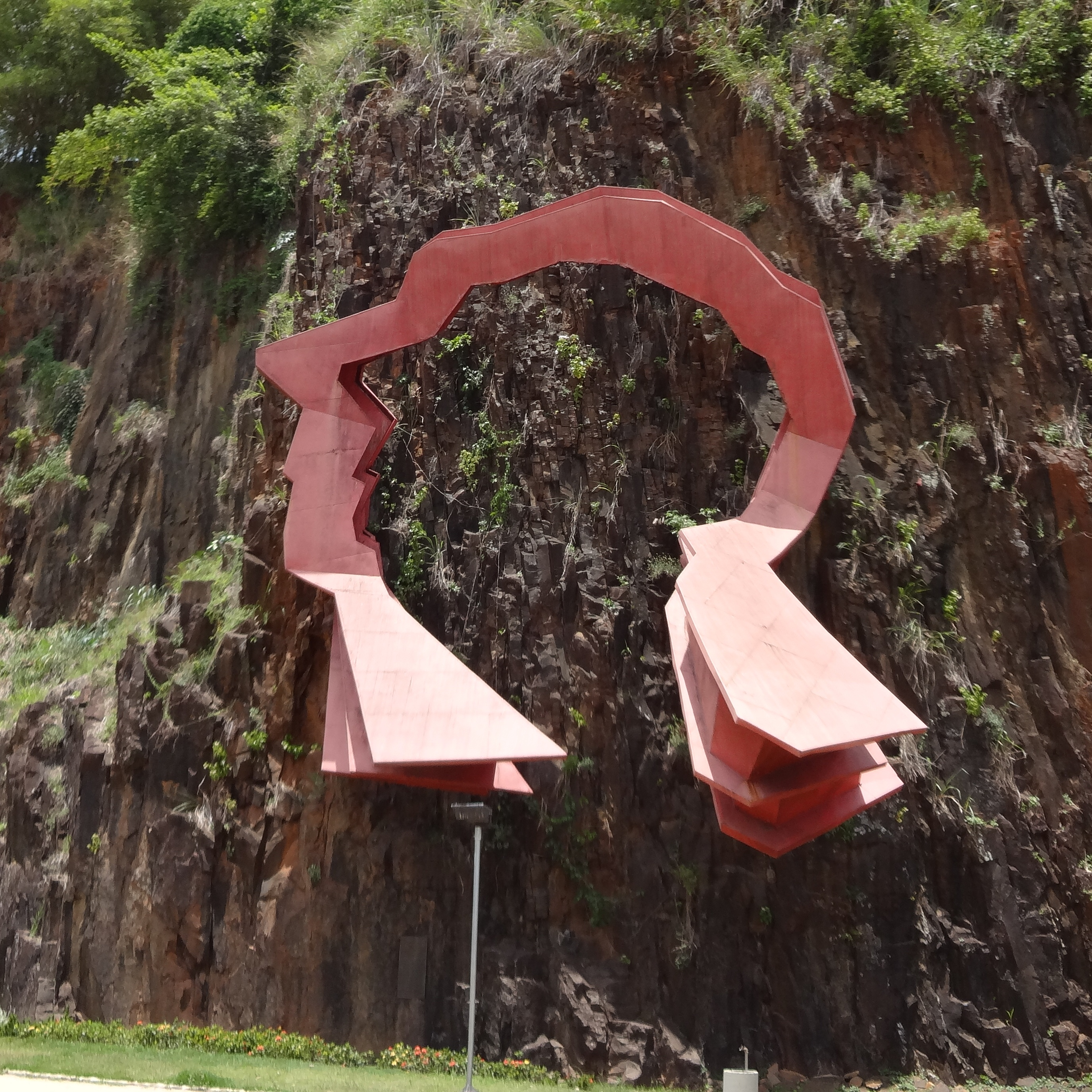 Monumento a Ulysses Guimarães na Praça Ulisses Guimarães em Campinas/SP (conhecida popularmente como Pedreira do Chapadão)